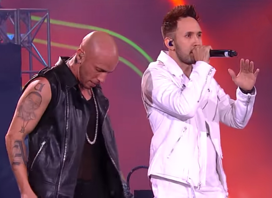 Concierto de Alexis & Fido en Viña del Mar